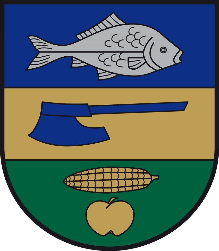 Wappen der Gemeinde Sankt Josef